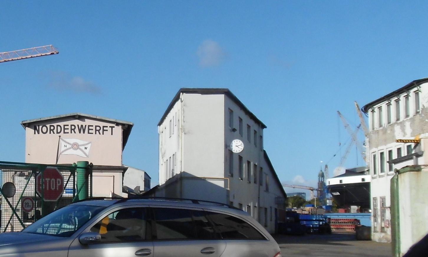 Norderwerft